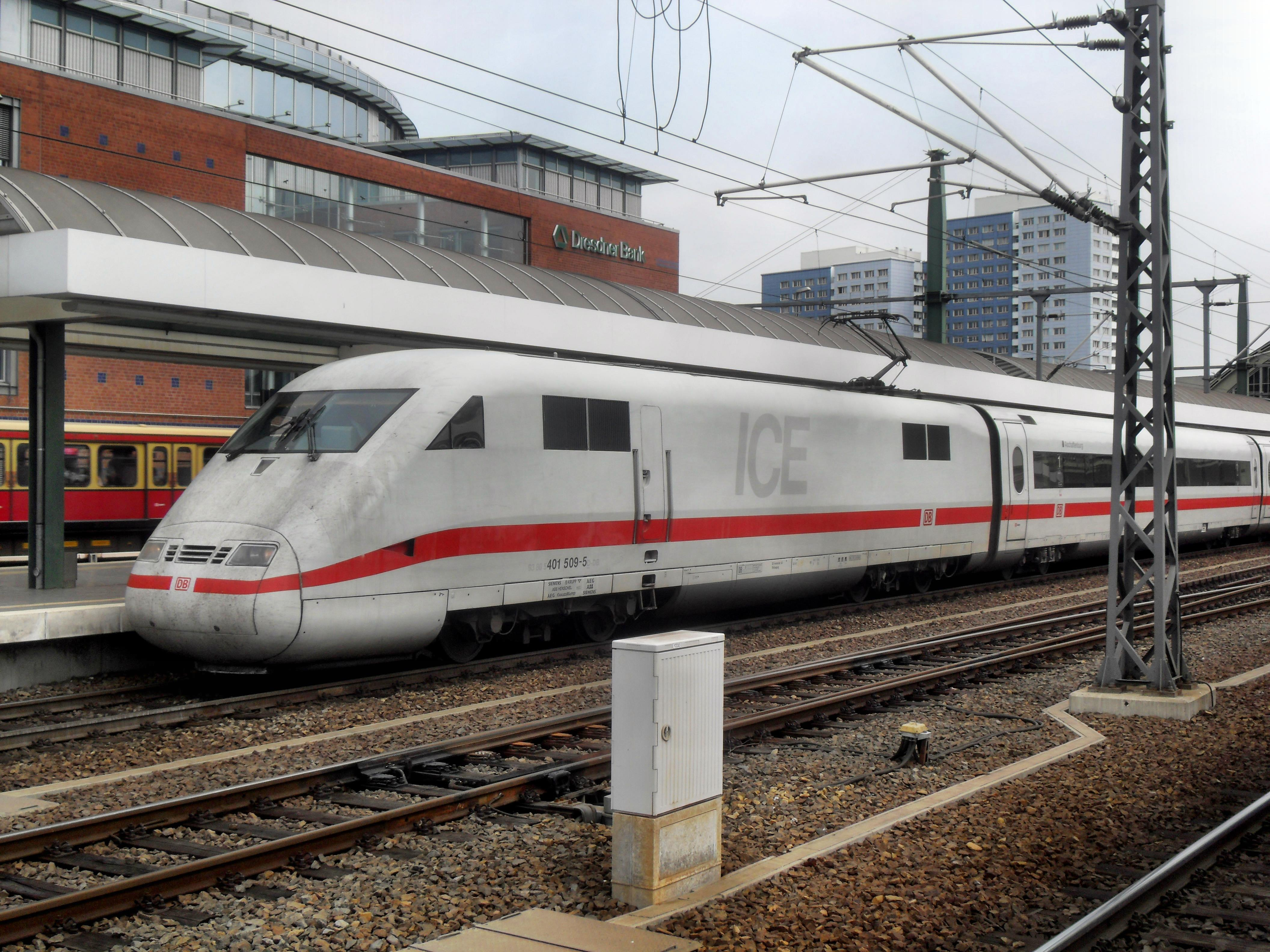 ICE 1 Aschaffenburg (Tz 09) im Berliner Ostbahnhof in Deutschland